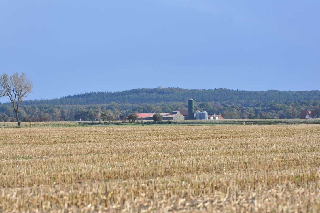 Dörfer in Niedersachsen Von Neuhaus aus den Wingster Wald mit einem Bauernhof in Cadenberge fotografiert